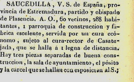 Principio del artículo dedicado al municipio de Saucedilla (Cáceres) en el Diccionario Geográfico-Estadístico de España y Portugal de Sebastián de Miñano (1827)